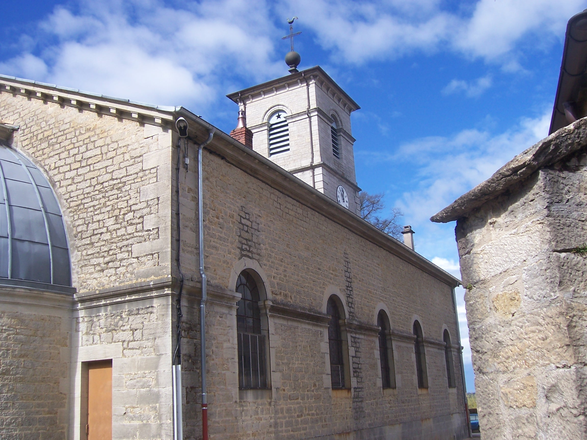 Eglise de Passenans